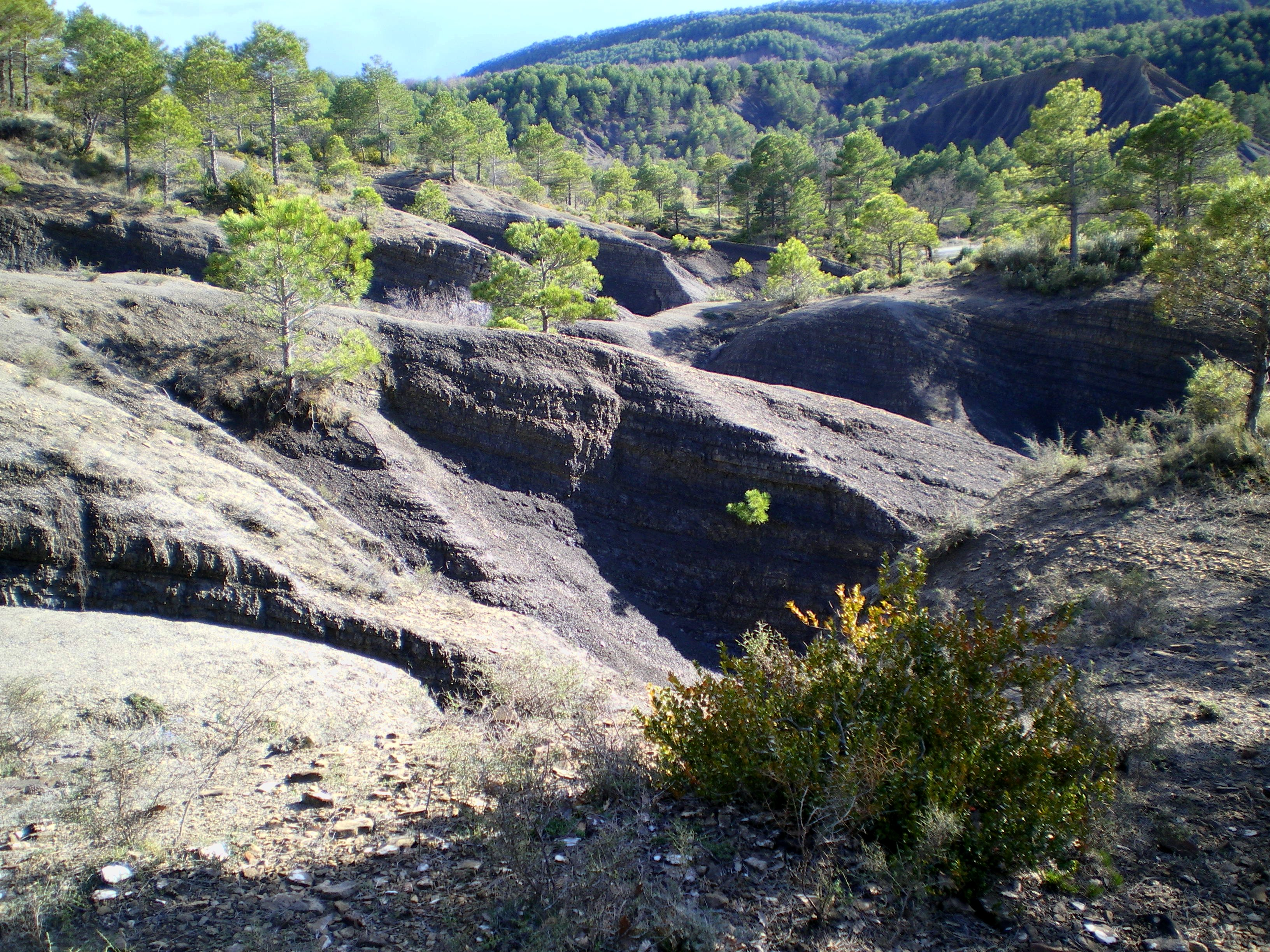 Terrero